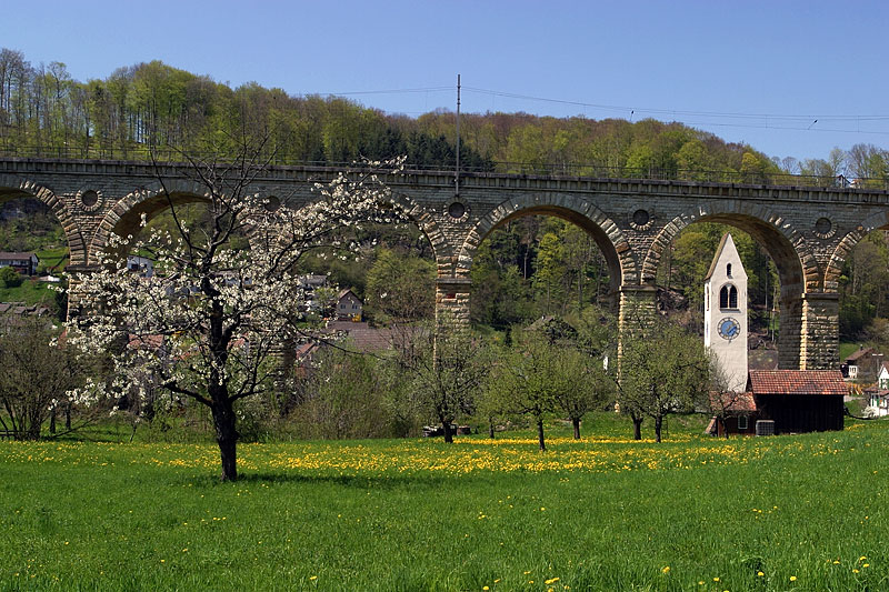 Kirche von Rümlingen mit dem Eisenbahnviadukt